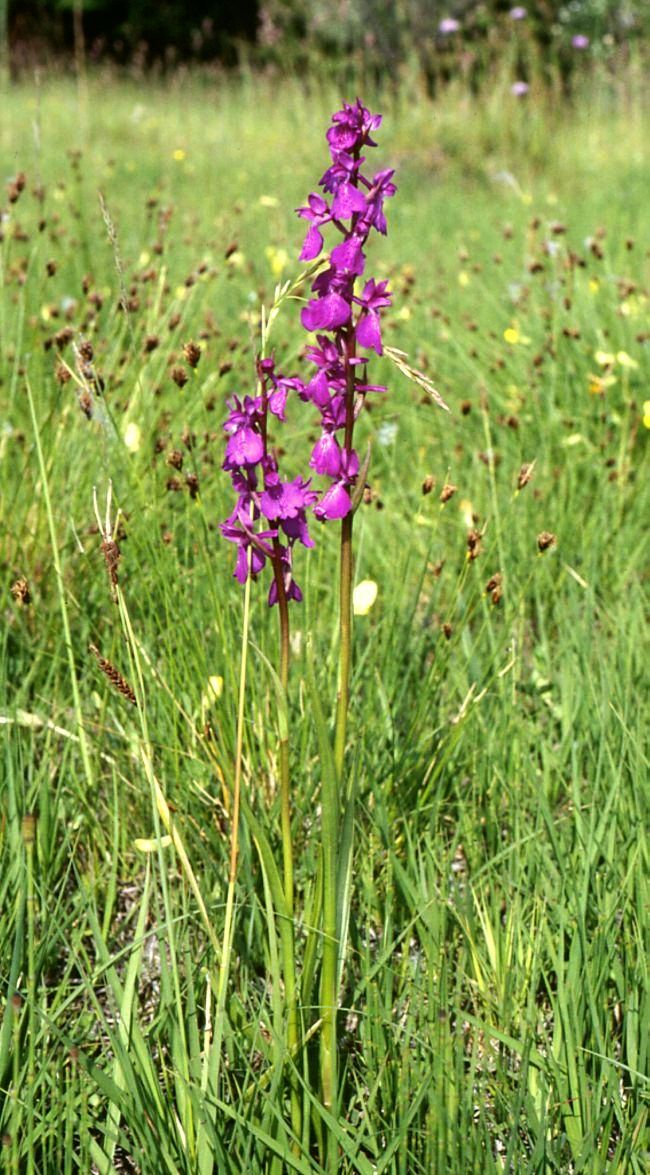 Sumpf-Knabenkraut (Anacamptis palustris, Syn.: Orchis palustris), Orchideen (Orchidaceae) - Österreich/Austria/Autriche: Burgenland, Seewinkel, W Illmitz